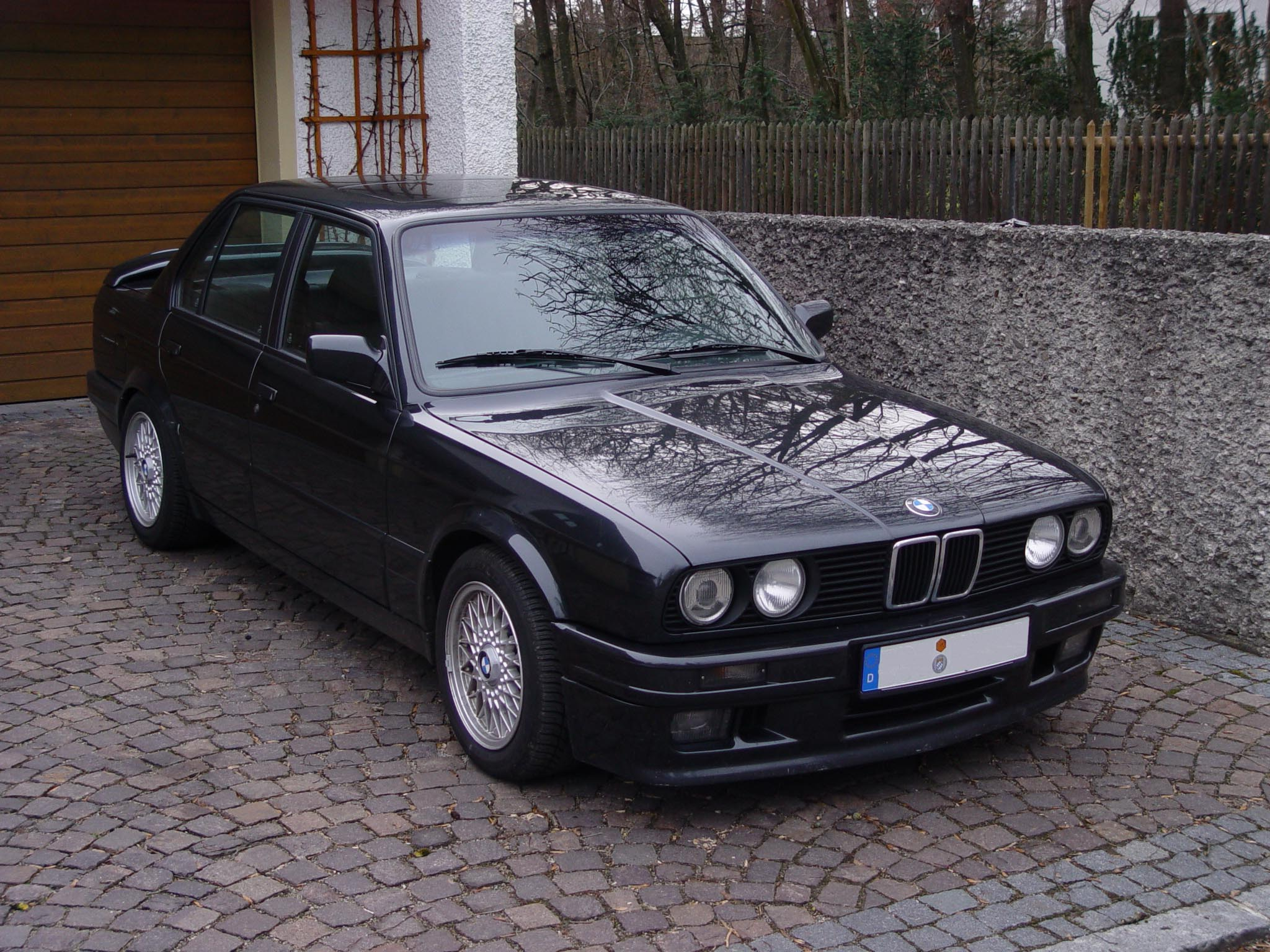 M-Tech 2 Front